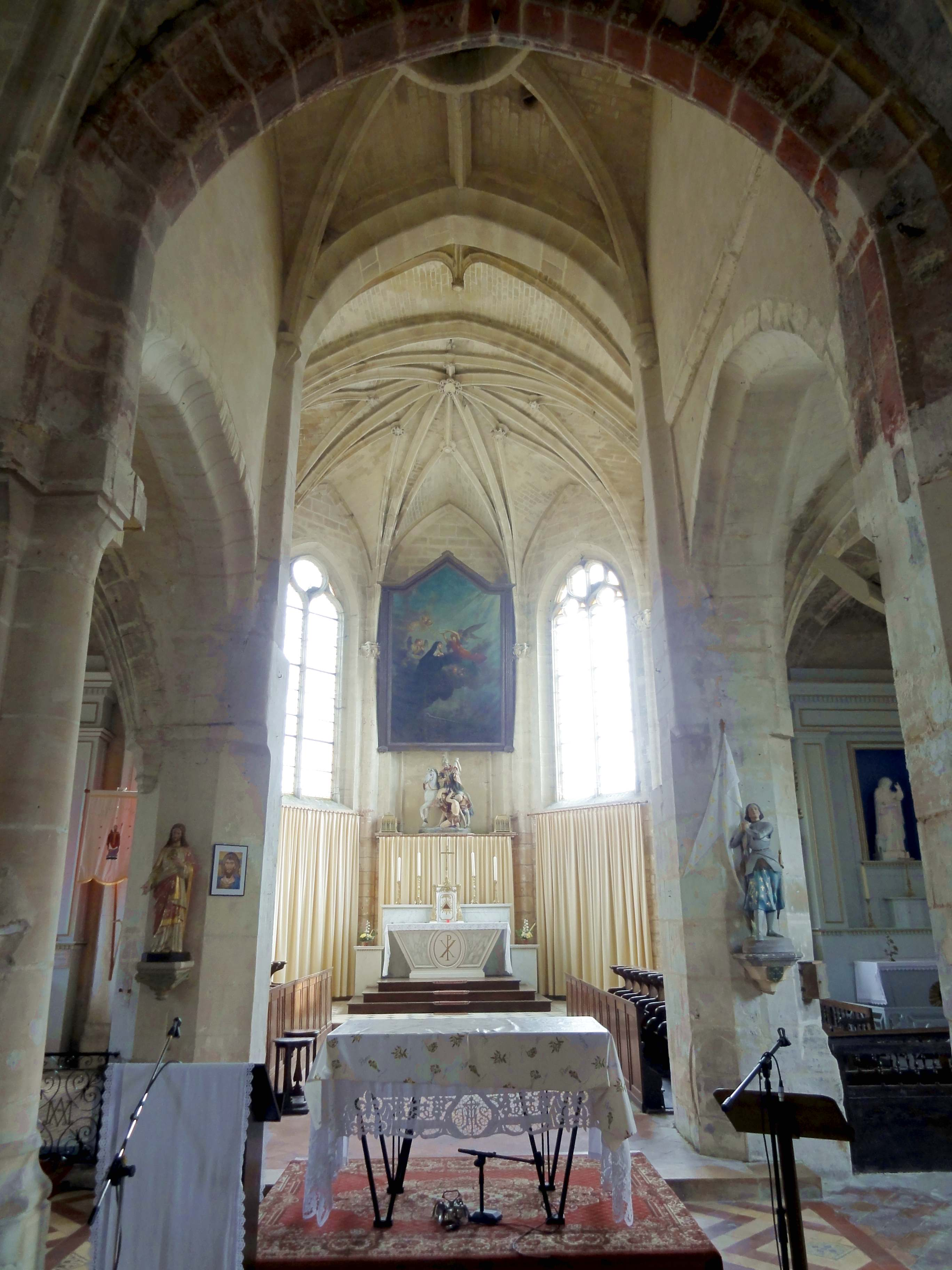 Voir titre.